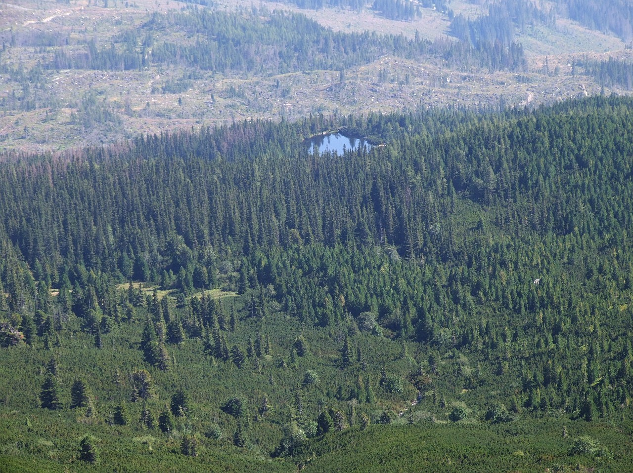 Jamski Staw i Jamy, widok z Pawłowego Grzbietu